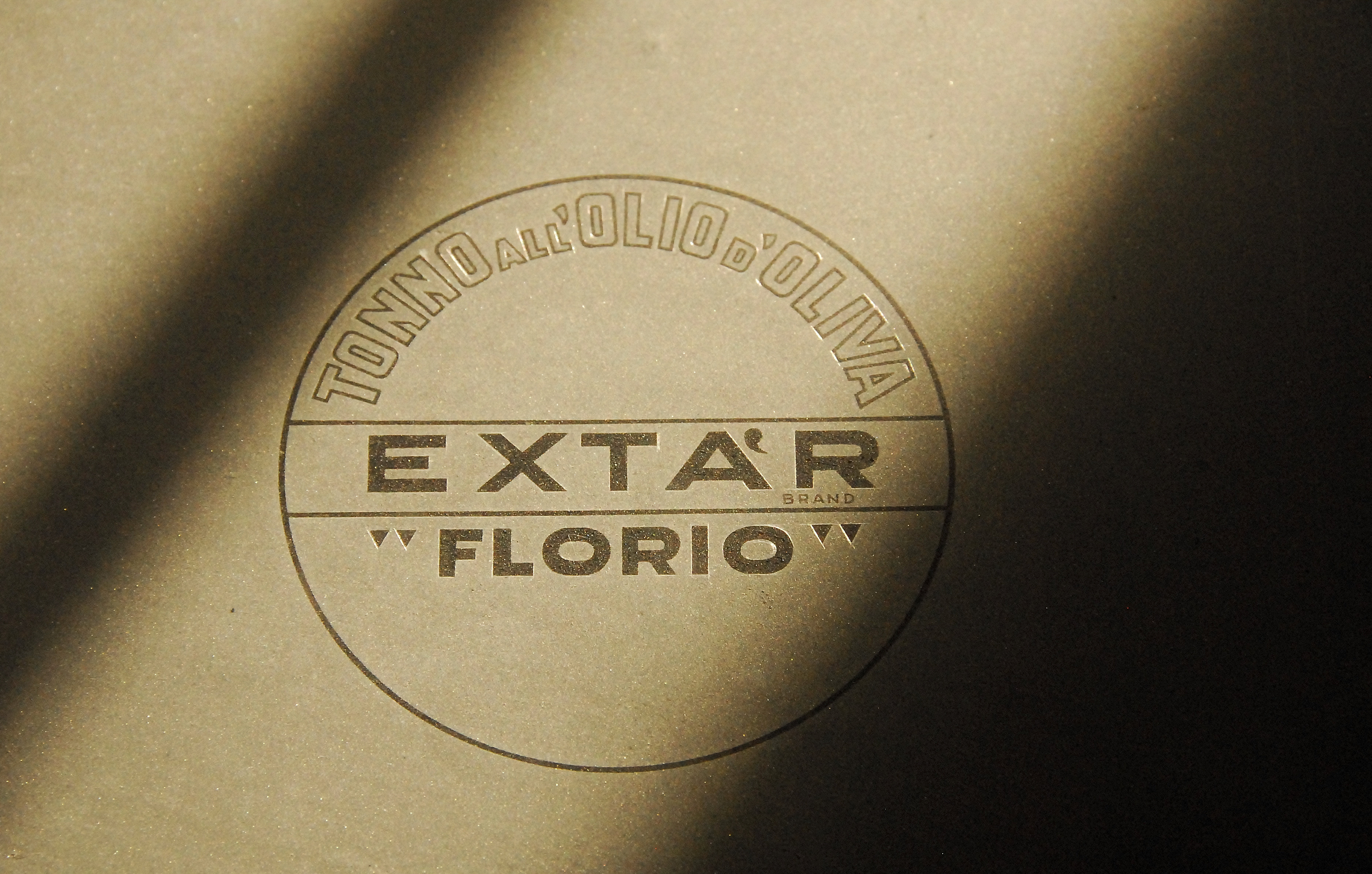 Palermo, ITA